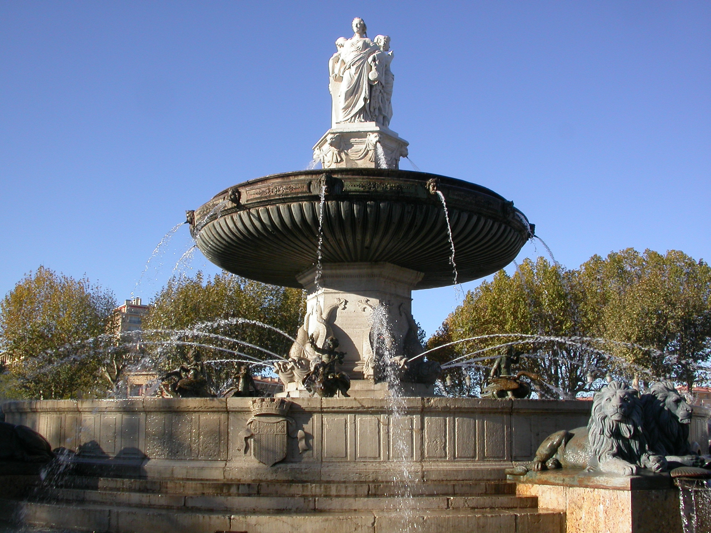 Fontaine de la Rotonde, Aix en Provence (France)